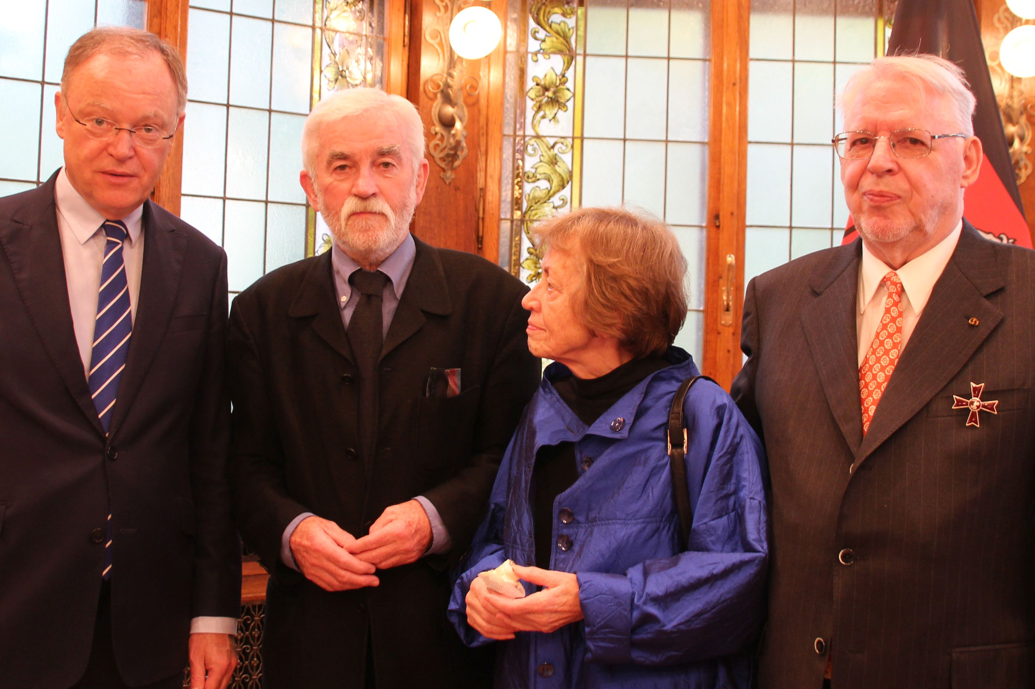 Stephan Weil, Niedersachsens Ministerpräsident, verlieh Klaus Wettig im Jahr 2017 das Verdienstkreuz 1. Klasse des Niedersächsischen Verdienstordens und händigte es ihm am 25. Oktober 2017 im Gästehaus der Niedersächsischen Landesregierung aus. An der Zeremonie nahmen unter anderen teil Inge Wettig-Danielmeier, früheres Mitglied des Deutschen Bundestages, frühere Bundesschatzmeisterin der SPD und Ehefrau des Geehrten, Gabriele Andretta, Präsidentin des Niedersächsichen Landtages, Wolfgang Jüttner, früherer Niedersächsischer Umweltminister, Dietmar Schulz, früherer Staatssekretär des Niedersächsischen Umweltministeriums, Walter Theuerkauf, früherer Landrat des Landkreises Aurich, sowie weitere Repräsentanten der niedersächsischen und der Göttinger SPD. Von links: Ministerpräsident Stephan Weil, Dietmar Schulz, Inge Wettig-Danielmeier, Klaus Wettig.